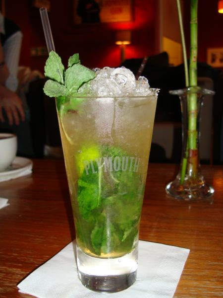 Mojito